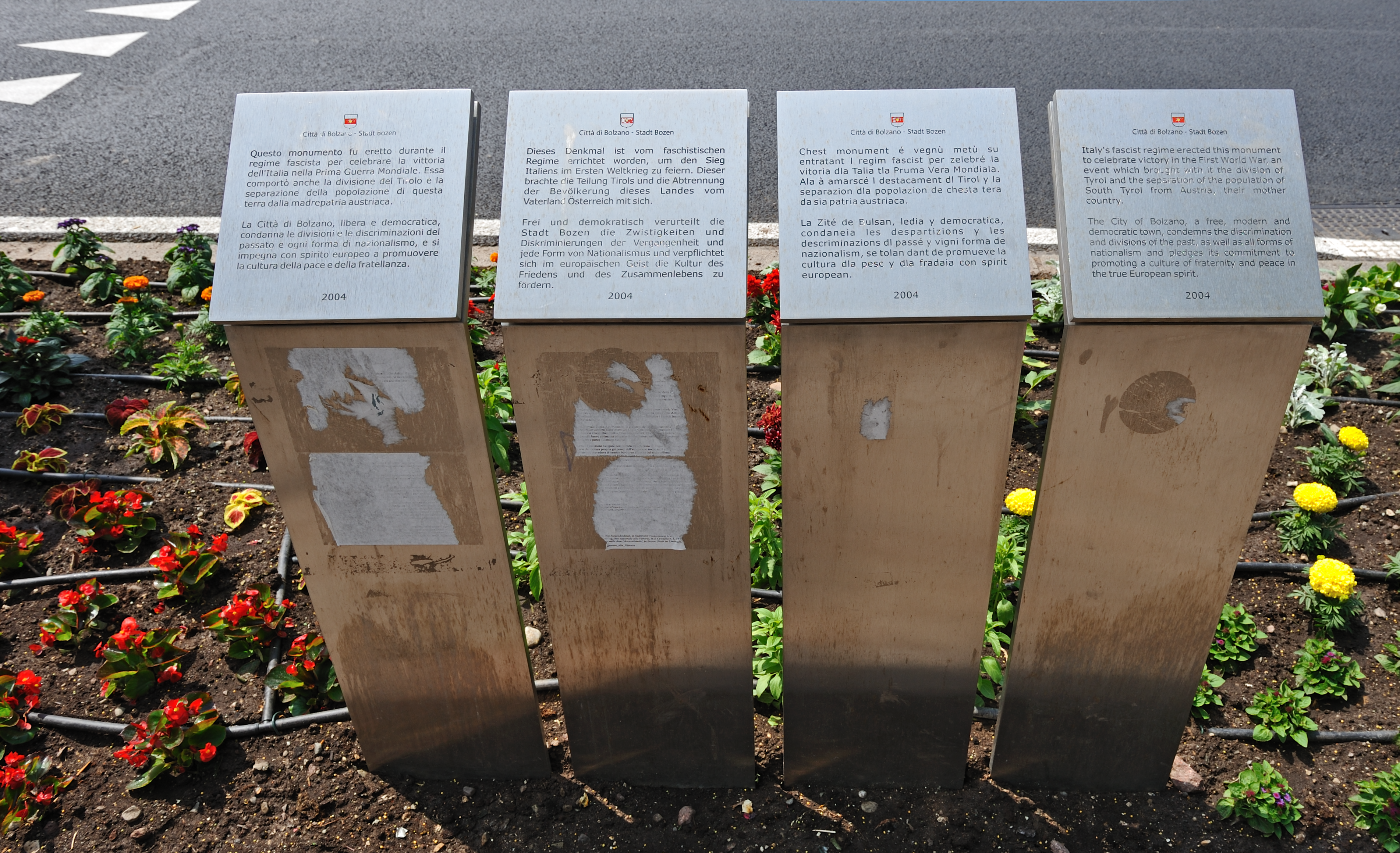 Schilder am Bozener Siegesdenkmal, aufgestellt 2004 von der Gemeinde zur historischen Einordnung in den drei Landessprachen italienisch, deutsch, ladinisch und in englischer Sprache